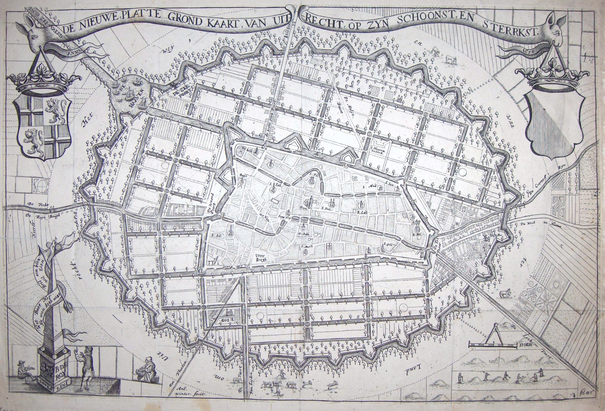 Plan van Everard Meyster met plattegrond uitbreiding Utrecht. Bernard de Roy tekende diens plan uit in 1670 onder de noemer "De Nieuwe platte grond kaart van Uitrecht op zyn schoonst en sterrkst". Meyster liet zich in zijn plan inspireren door het enkele jaren oudere plan van Hendrick Moreelse. De 17e eeuwse uitbreidingsplannen zijn vrijwel niet uitgevoerd.